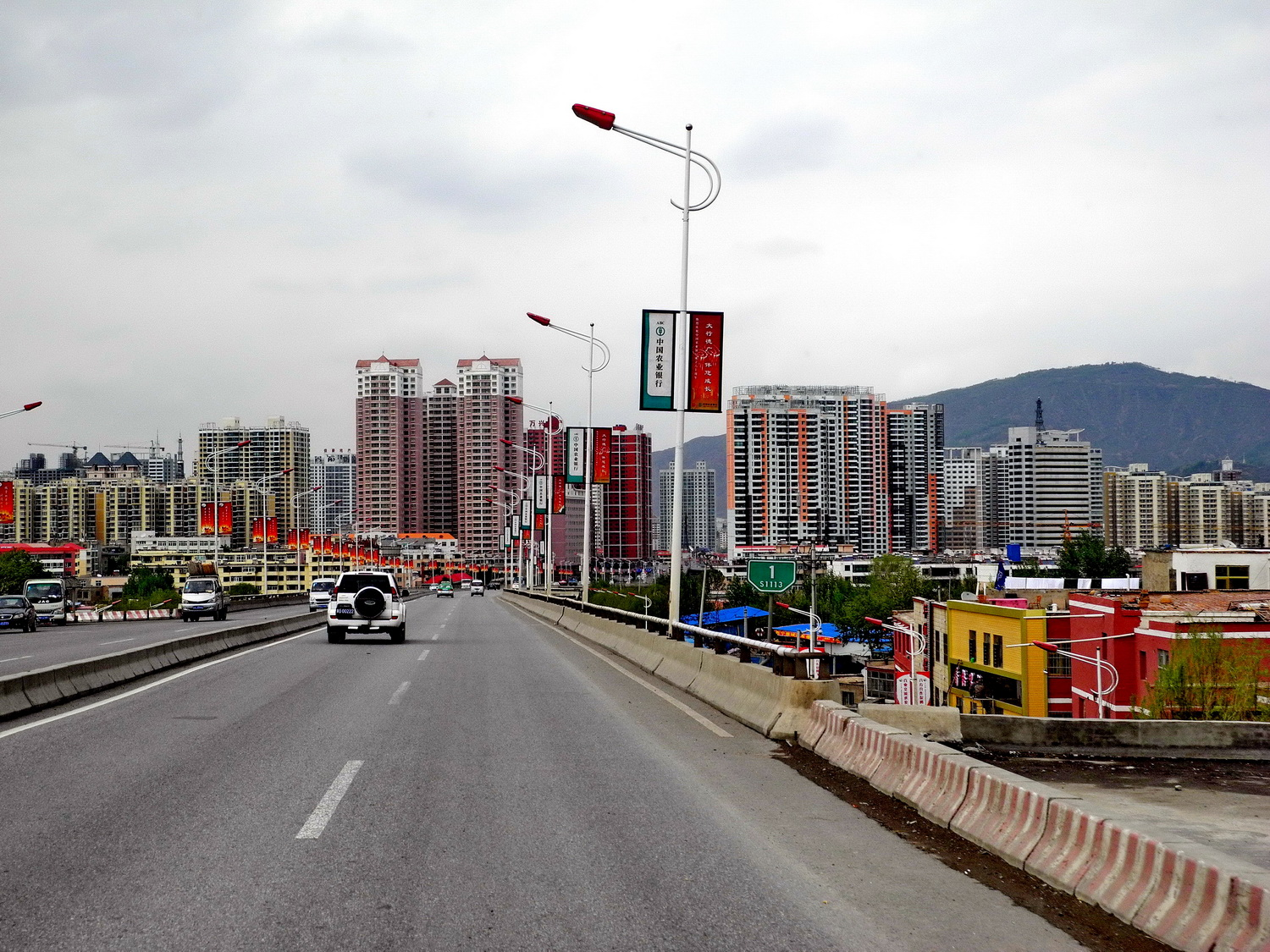 Xining city